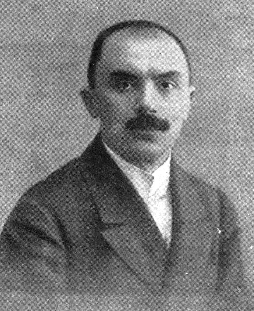 Bródy Miklós magyar zeneszerző, karmester, sakkmester.